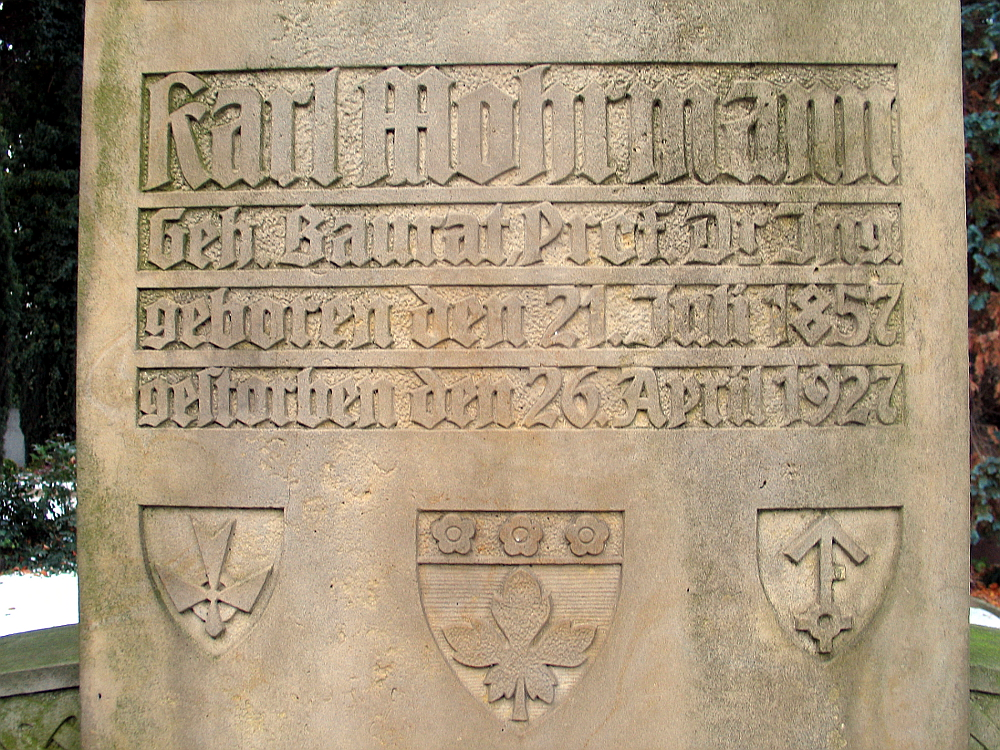 Details der Inschriften auf dem Grabstein des Familiengrabes um den Architekten Karl Mohrmann; unter den Lebensdaten des Architekten sind drei Wappen-ähnliche Zeichen zu sehen. Das linke zeigt das - durch einen Ring leicht abgeänderte - Hüttenzeichen der Bauhütte zum weißen Blatt, die sogenannte "Schwalbe". Ganz rechts ist laut Auskunft des Bauhistorikers Sid Auffarth das durch die Bauhütte vergebene "Künstlerzeichen" für Karl Mohrmann zu sehen, der mit der Mitglieds-Nummer "82" bei der Bauhütte verzeichnet ist. Das mittlere Symbol, ein Blatt mit drei Blüten darüber, ist bis auf weiteres noch ungeklärt ...